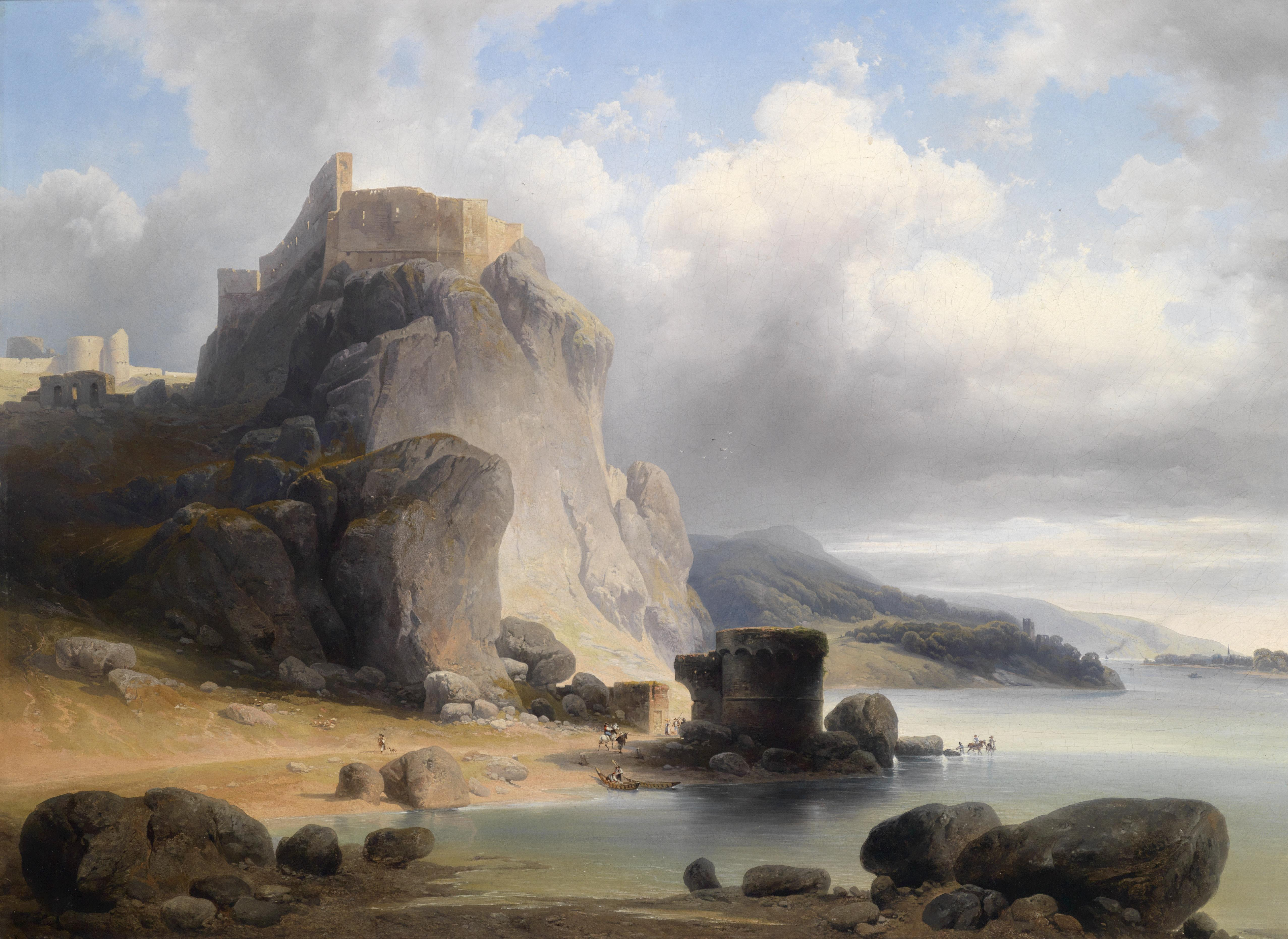 Blick auf die Burgruine Devin (Theben)